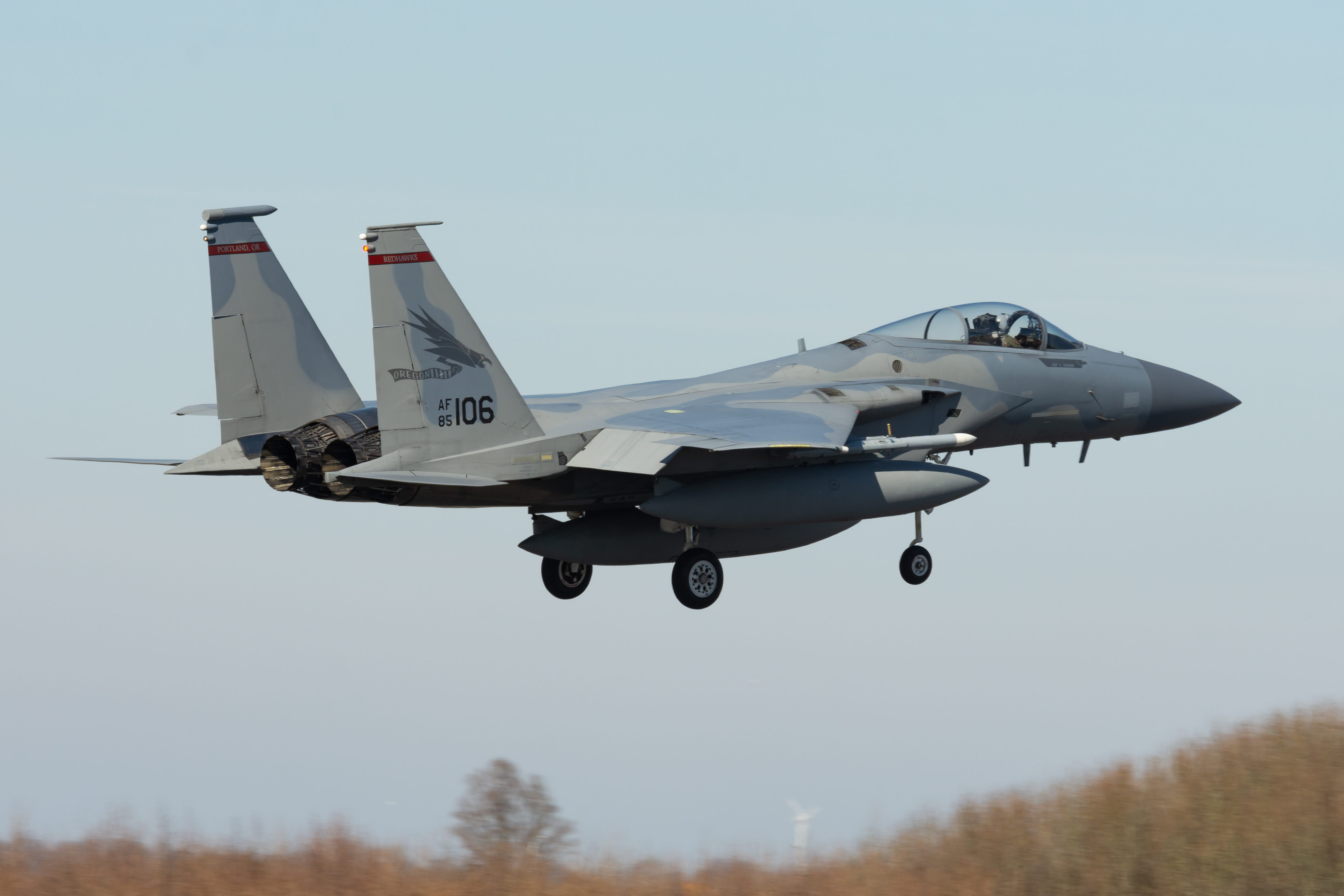 Leeuwarden, April 2018 Frisian Flag